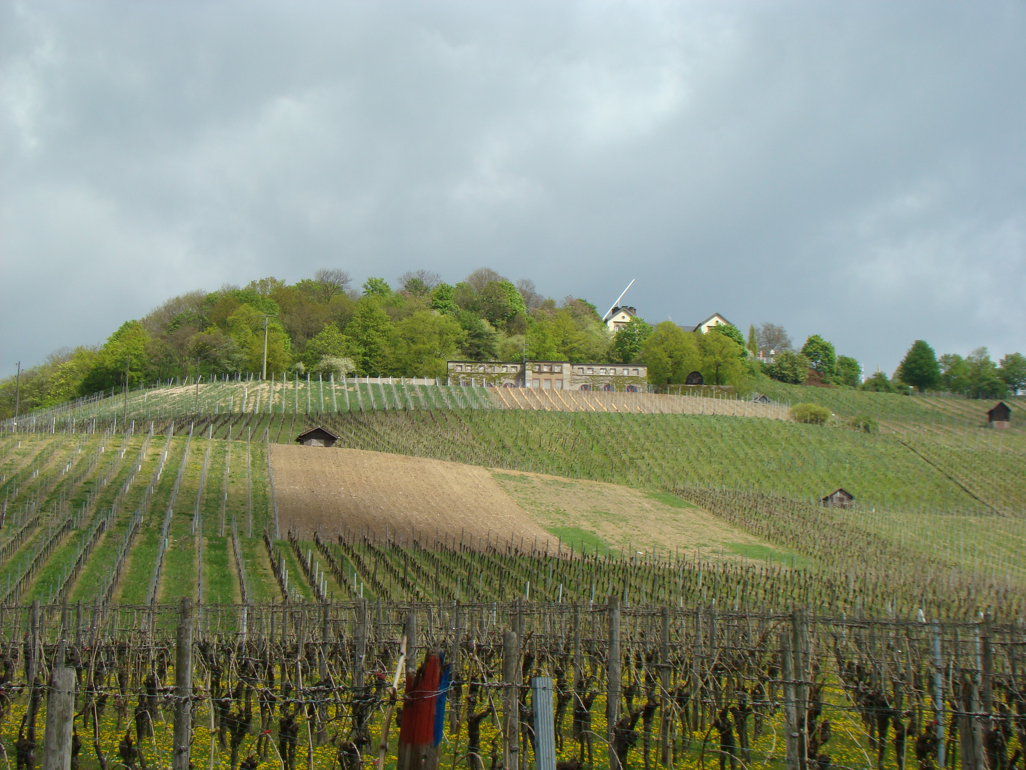 Wasserhochbehälter unterhalb der Wartberggaststätte in Heilbronn